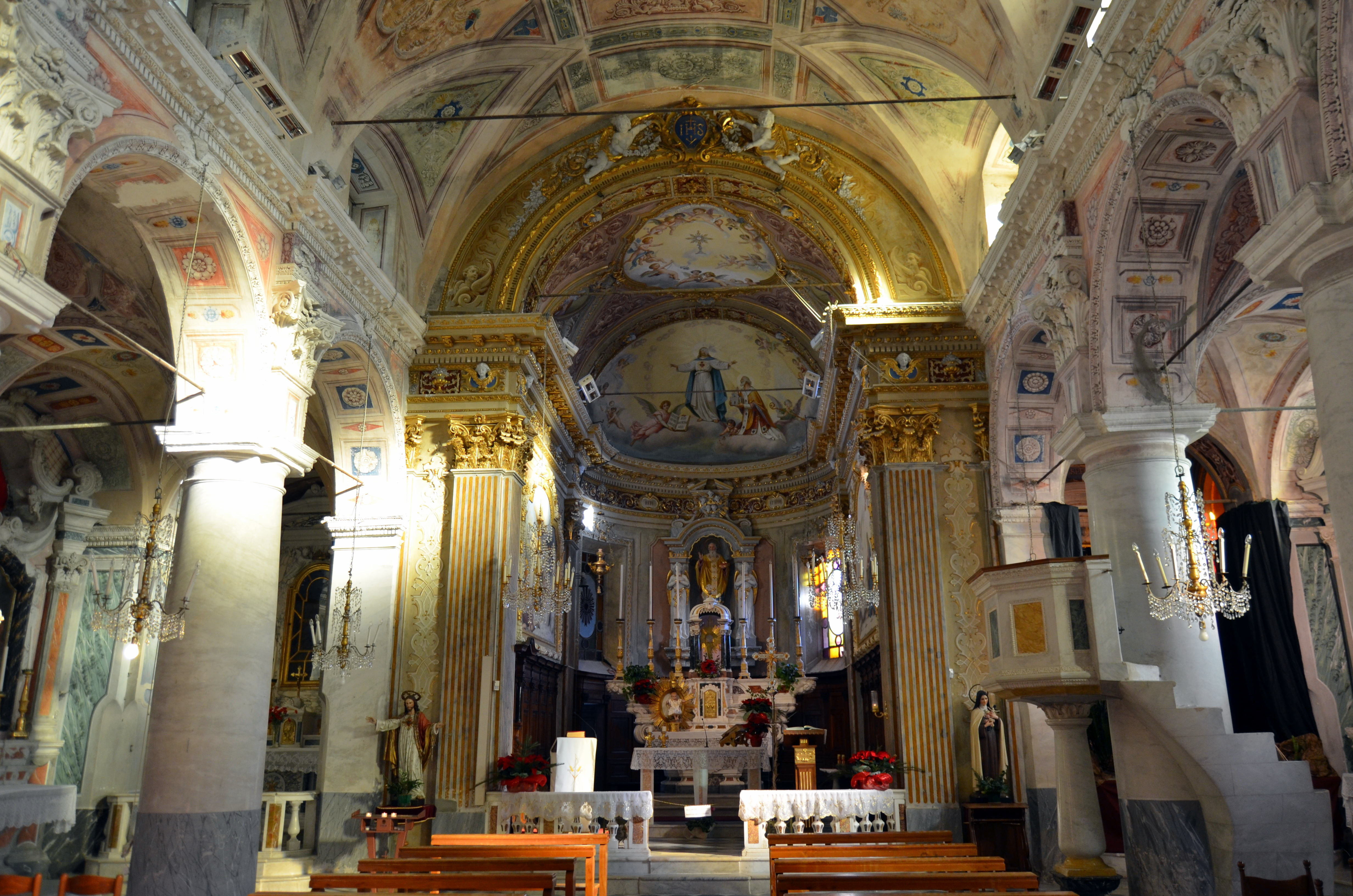 Navata centrale della chiesa di San Nicolò, Coreglia Ligure, Liguria, Italia